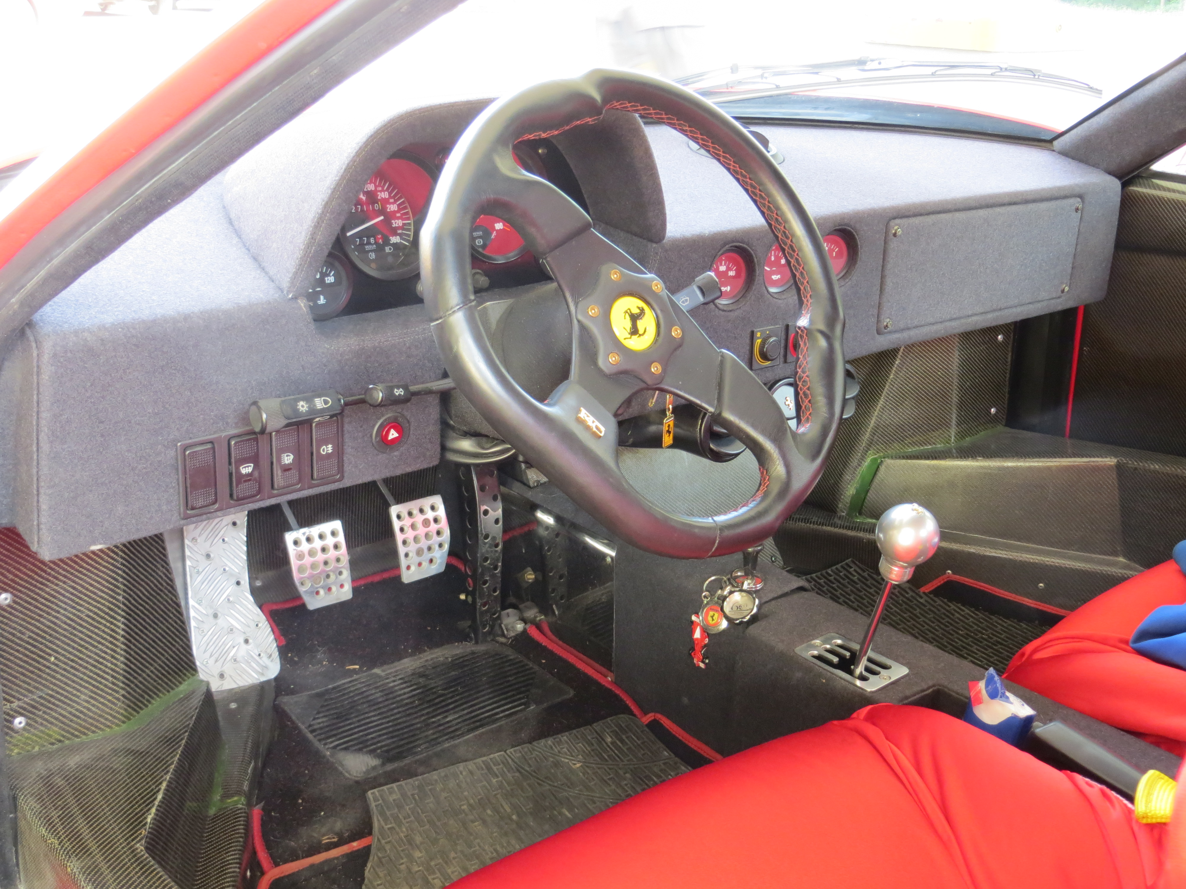 Ferrari F40 foto scattata da me il 6.6.14